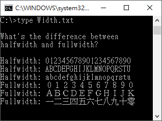 全形與半形之差異。